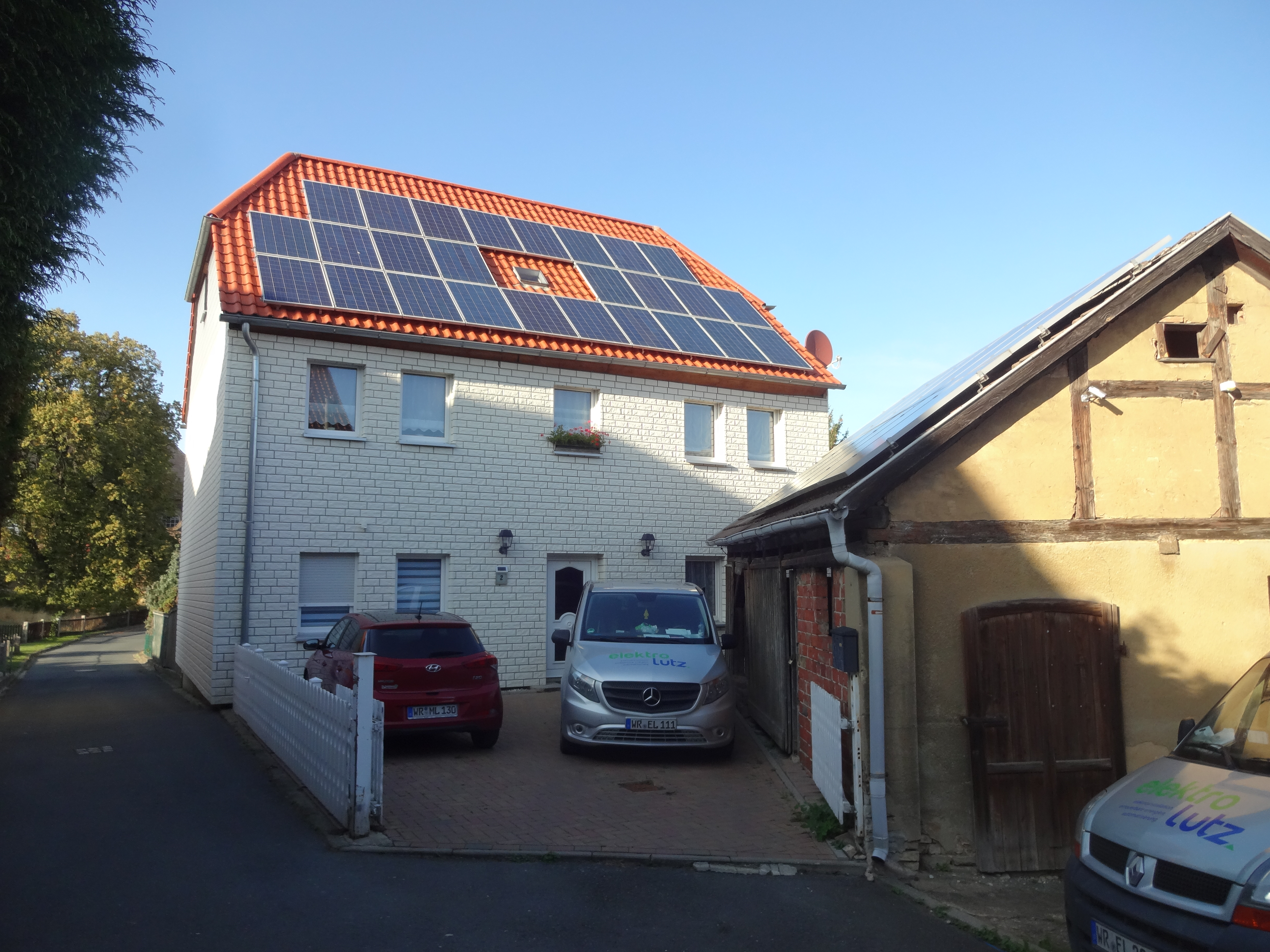 denkmalgeschütztes Wohnhaus in der Kirchstraße 2 in Heimburg